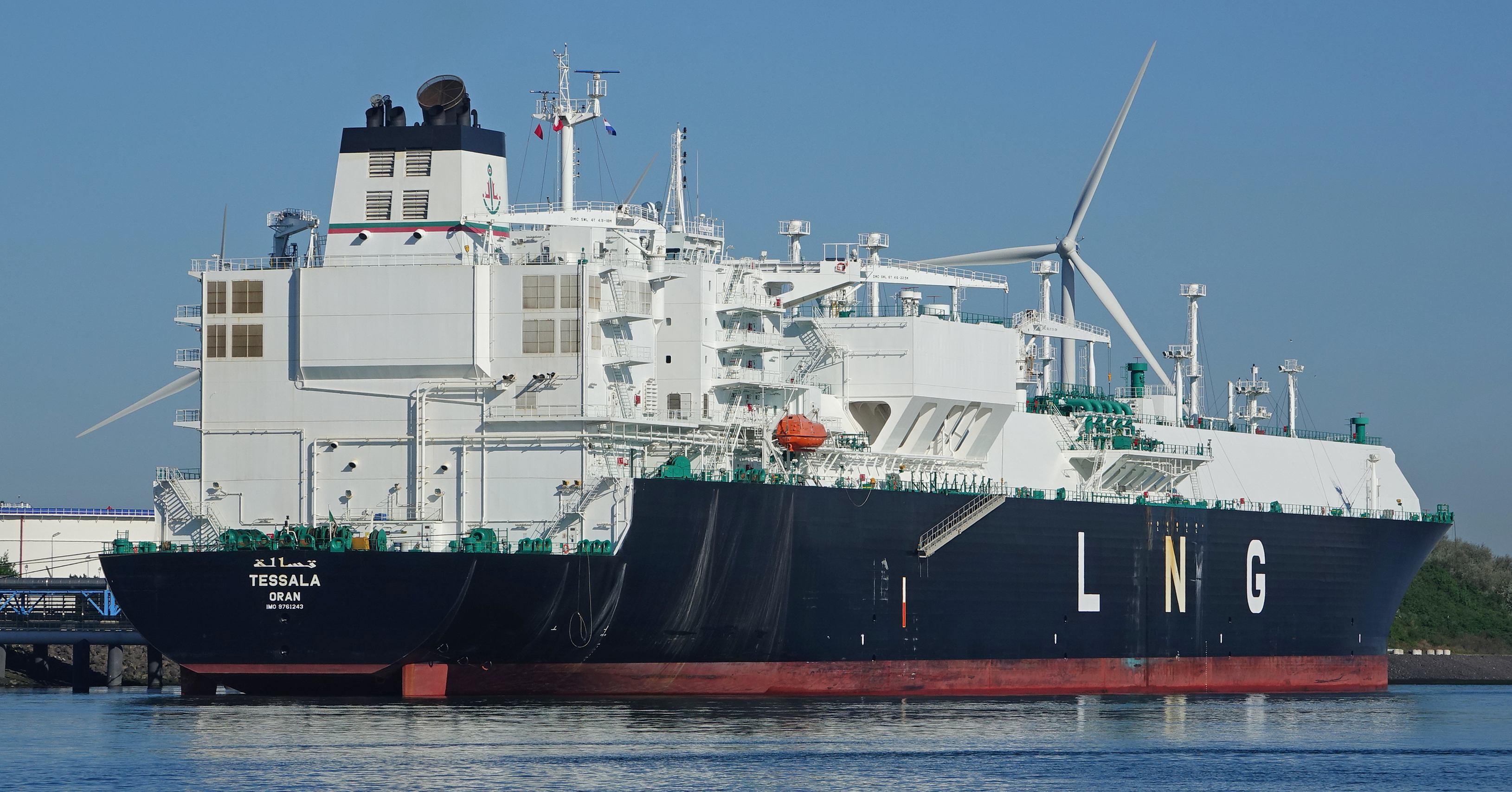 Nijlhaven 8-5-2018